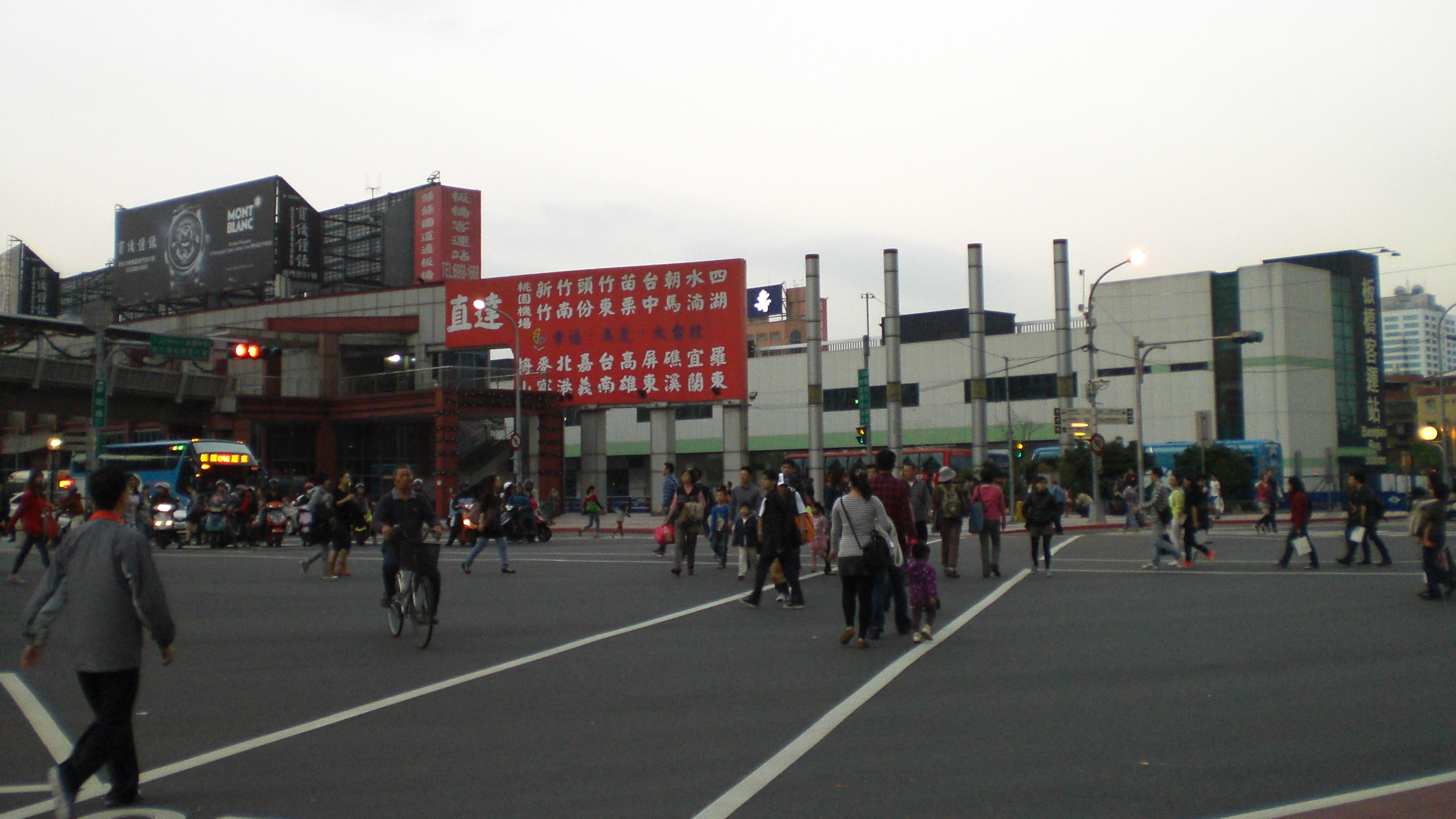 板橋客運站。